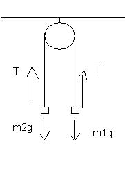 תרשים כוחות בגלגלת